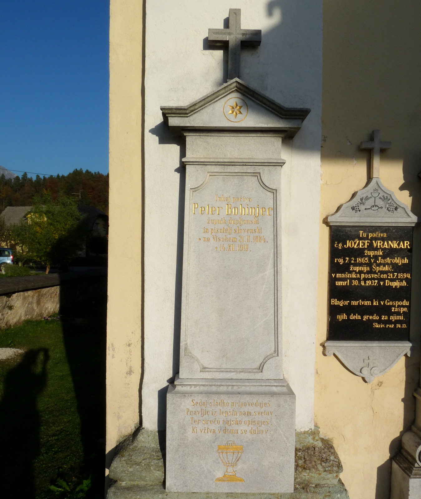 Peter Bohinjec, nagrobnik ob cerkvi v Sp. Dupljah